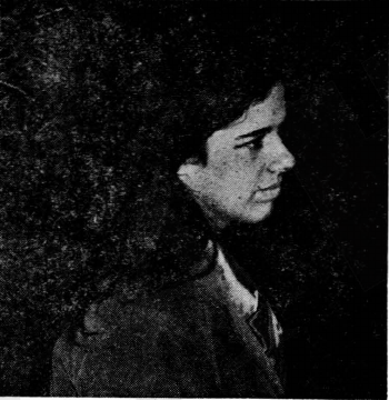 La artista Graciela Carnevale en el panfleto de su Acción del Encierro de Octubre de 1968